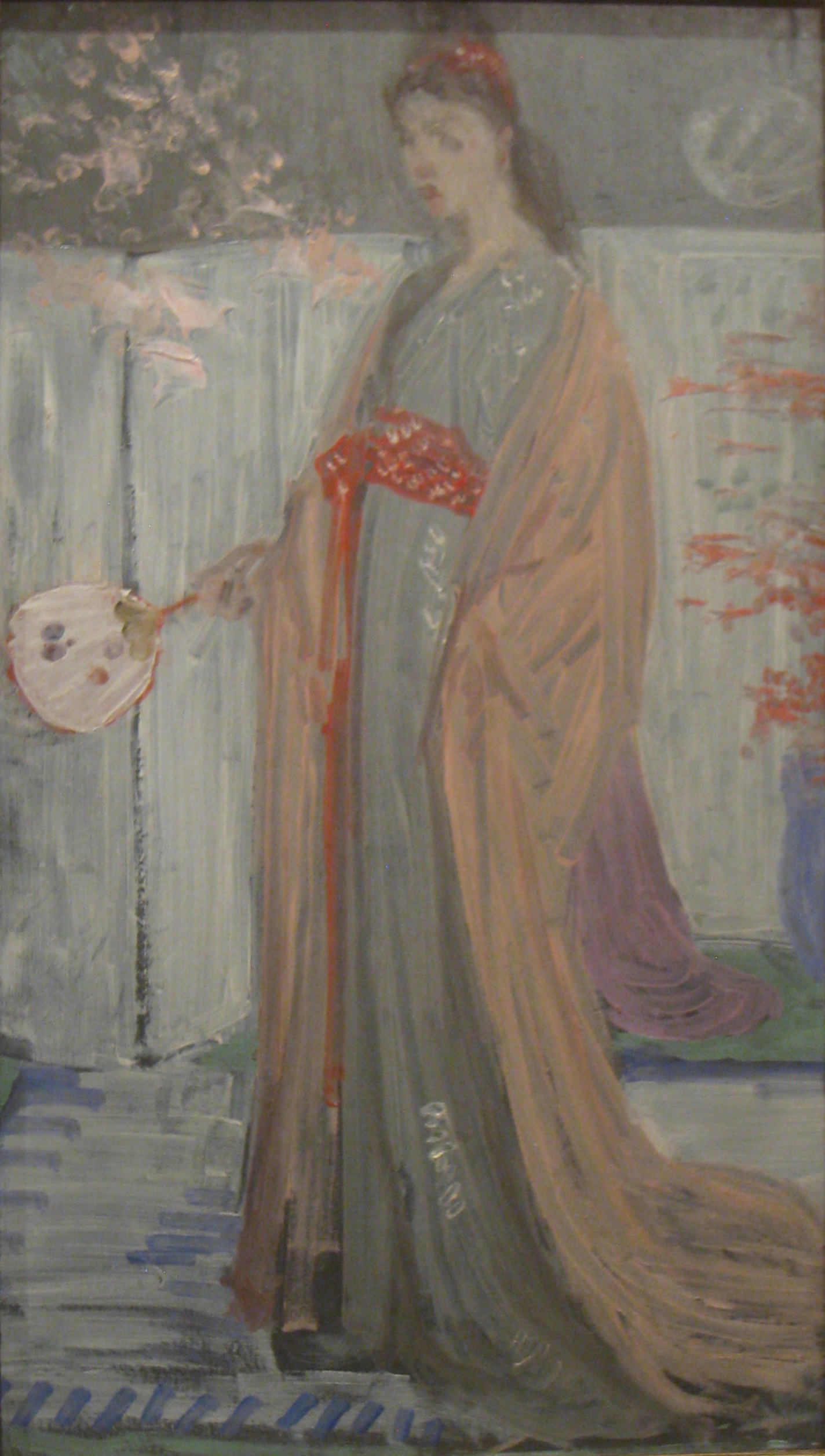 Sketch for Rose and Silver - La Princesse du Pays de la Porcelaine.